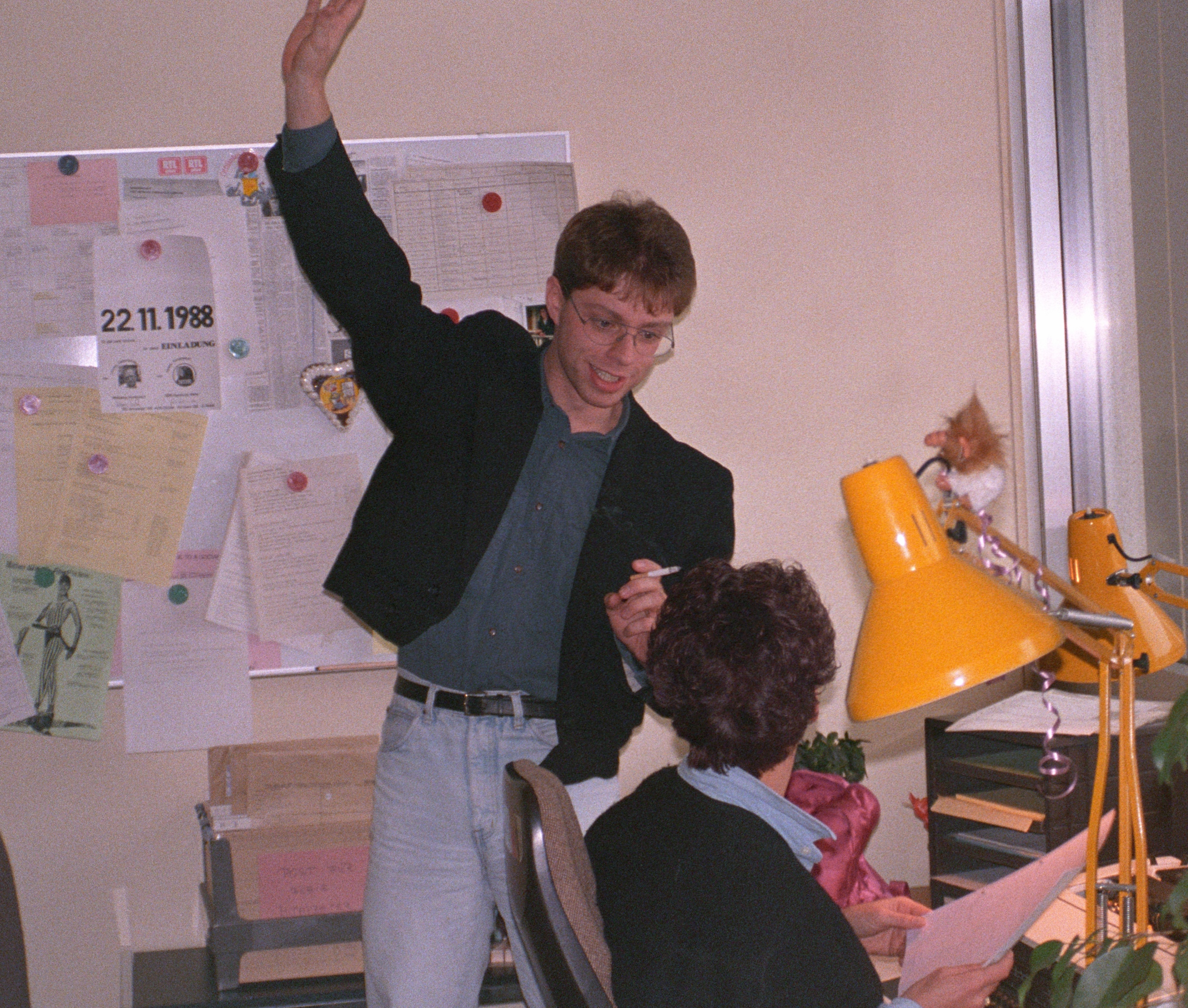 Stefan Niemann, Leiter des ARD-Studios Washington (seit Juli 2017) , auf dem Bild als Volontär im Hamburger Journal 1988